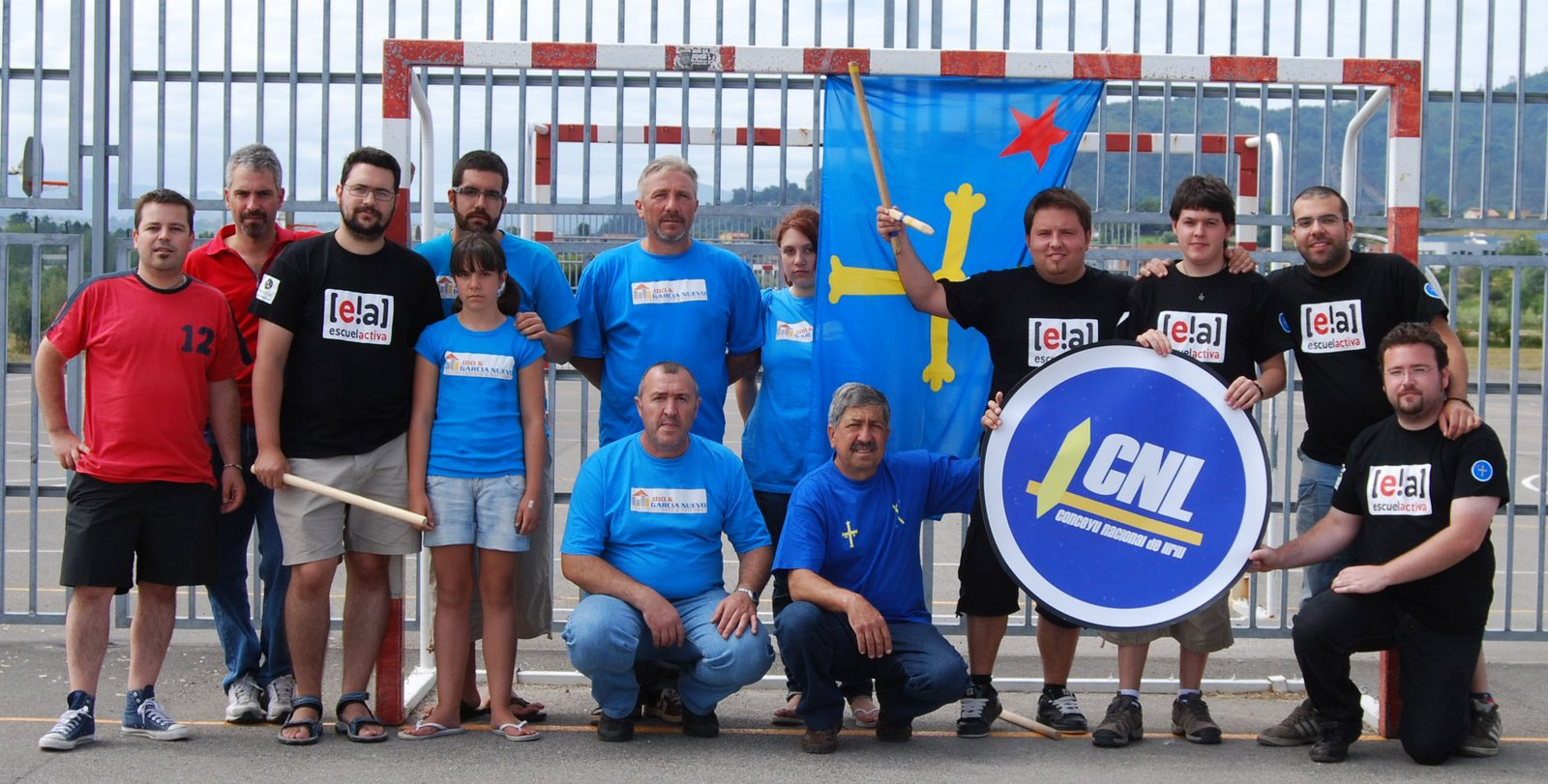 Semeya de familia de los participantes na primer xornada del I Campionatu d'Asturies de liriu